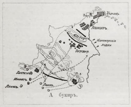 Изображение из «Военной энциклопедии» изданной книгоиздательским товариществом Ивана Дмитриевича Сытина. Санкт-Петербург); 1911—1915 гг. Фото к статье «Абукир».